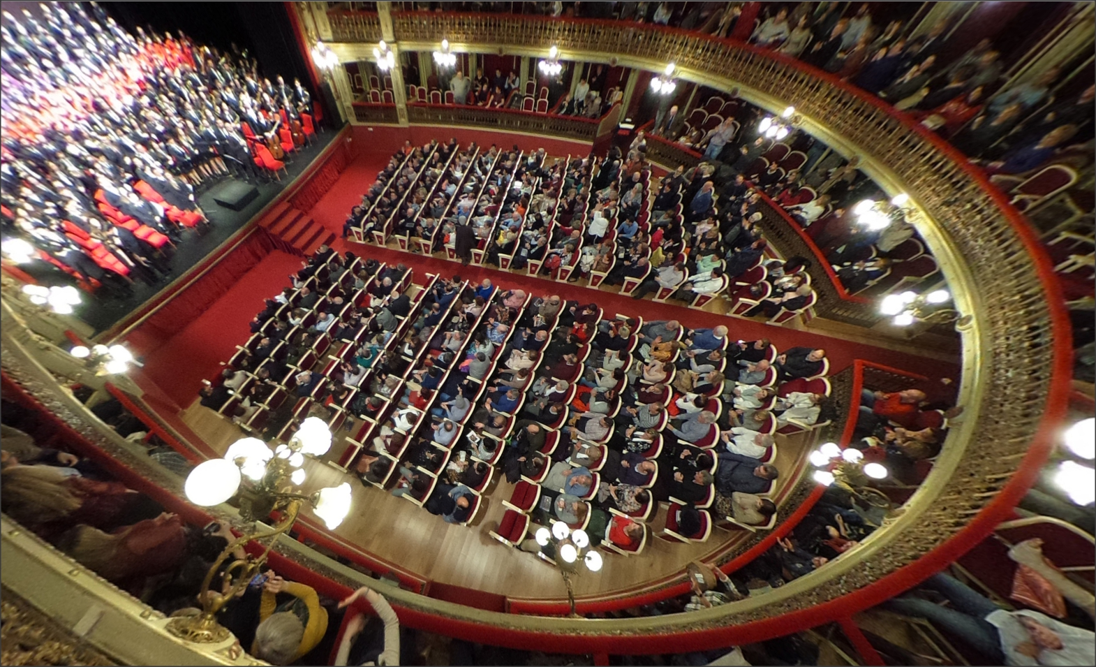 Concierto en Teatro Romea de la Ciudad de Murcia, con Carmina Burana - Platea Omnioramaː Pulse para omniorama